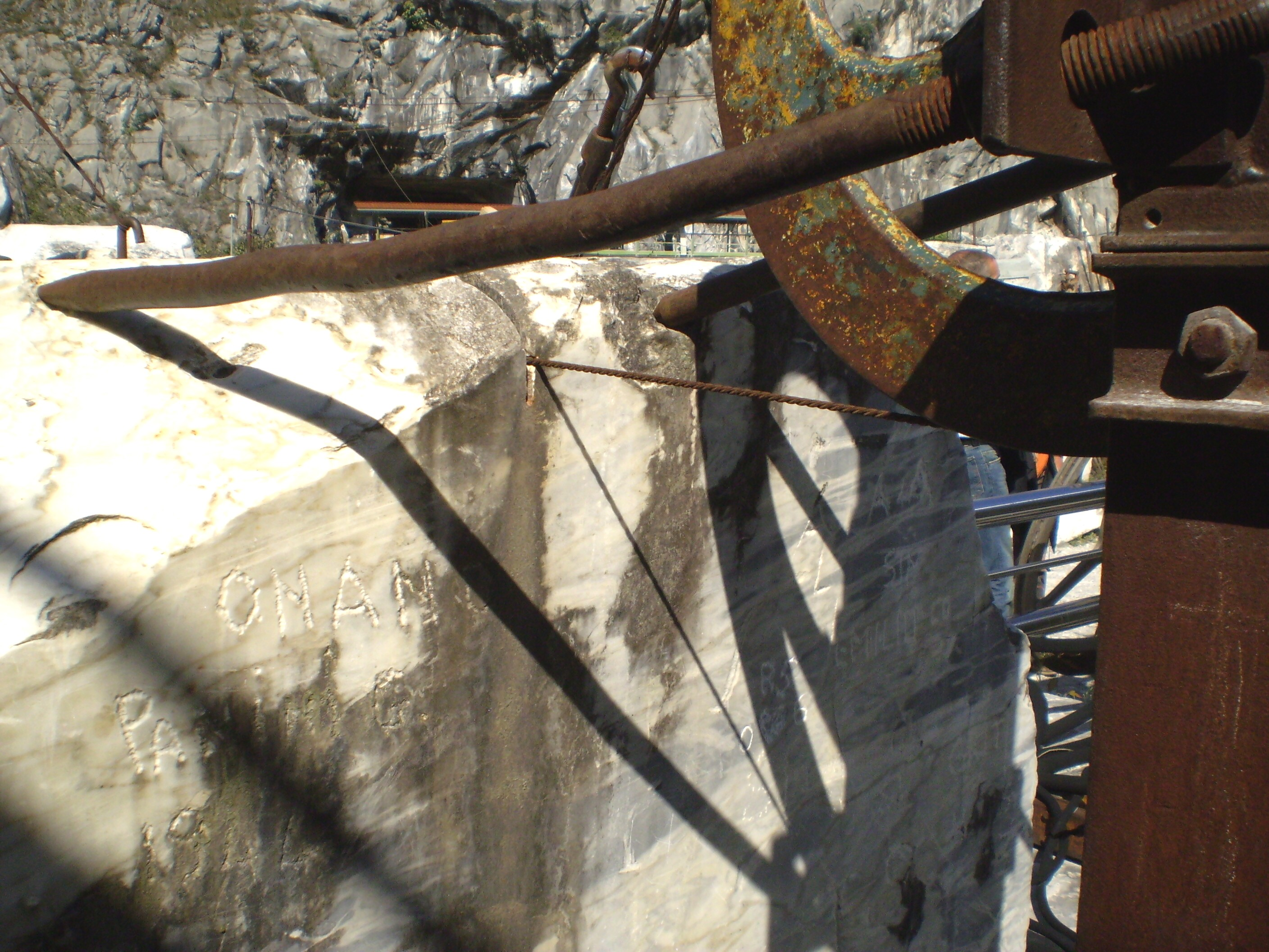 Marble block at Carrara, Province Massa-Carrara, Italy. Museo di Fantiscritti